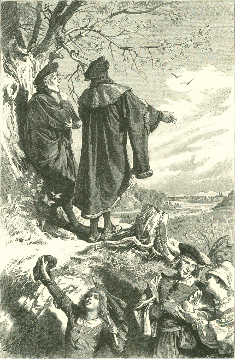 Illustration zu Goethes Faust I, Vor dem Tor, Osterspaziergang